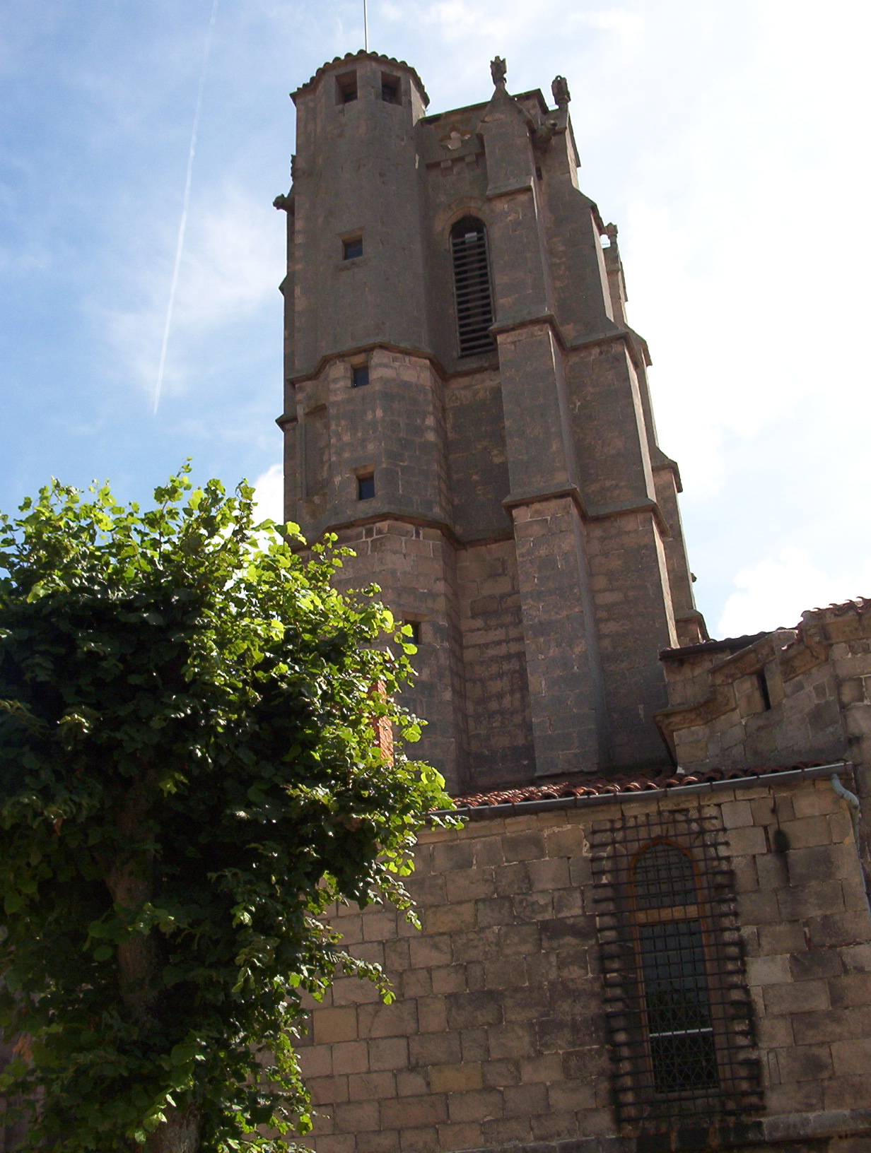 Collégiale de Saint-Bonnet-le-Chateau